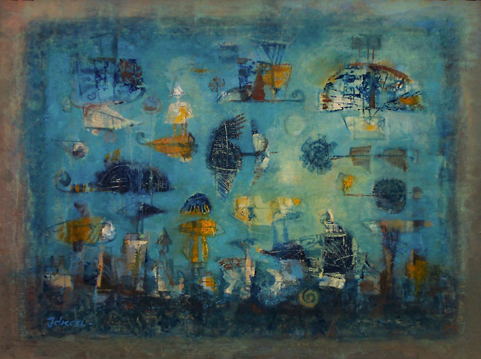 Jánosi Katalin (1951. november 2.- ) magyar festőművész, gobelinművész alkotása: Álmomban repültem, 2005. olaj, 60x80 cm